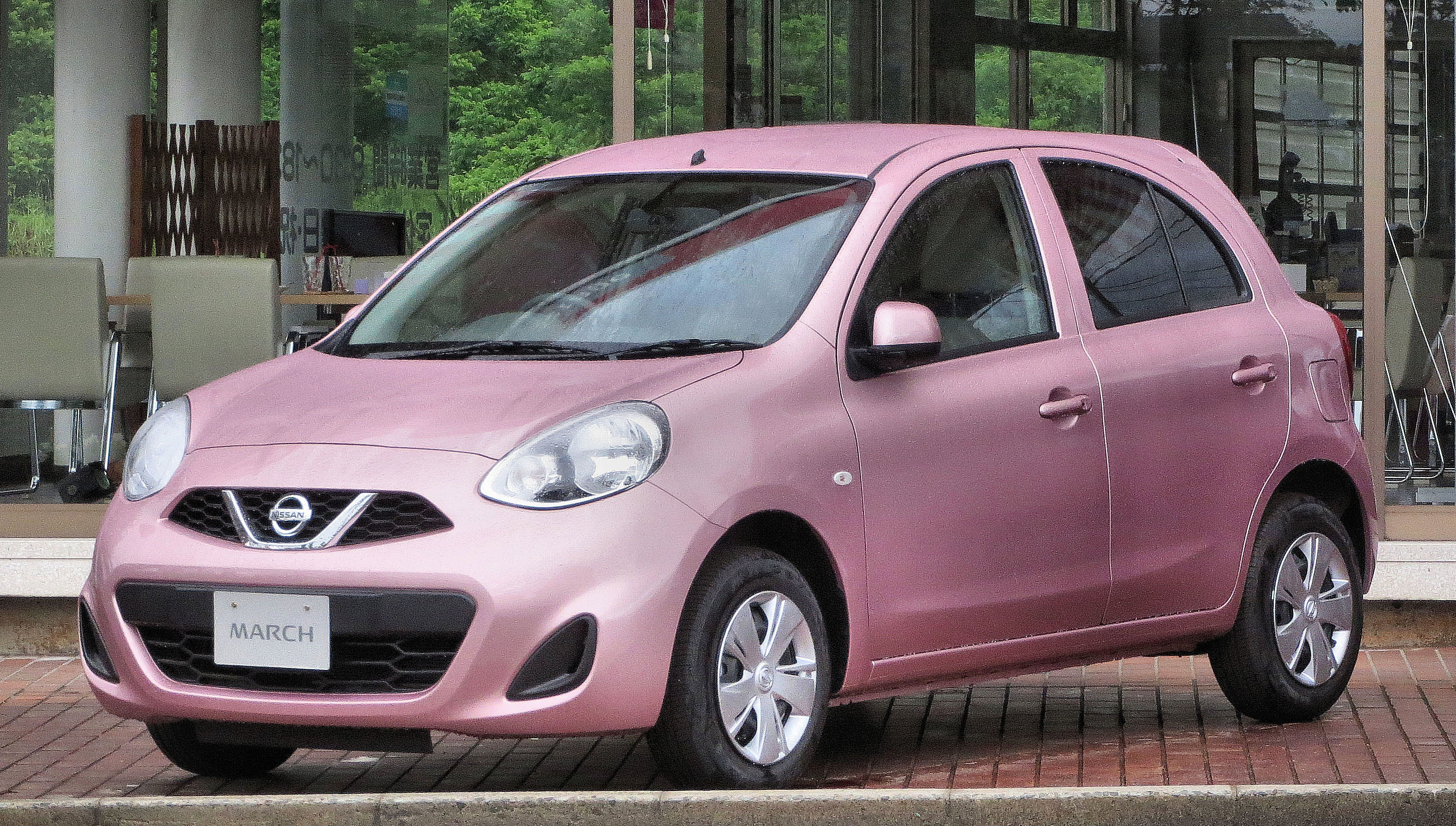 日産マーチ K13型 1.2X Vセレクション(後期型) 日産プリンス店展示車